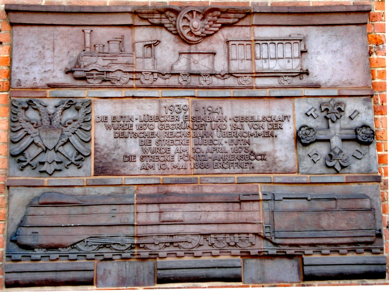 Gedenktafel an die Eisenbahn Luebeck-Eutin am Bahnhof in Bad Schwartau